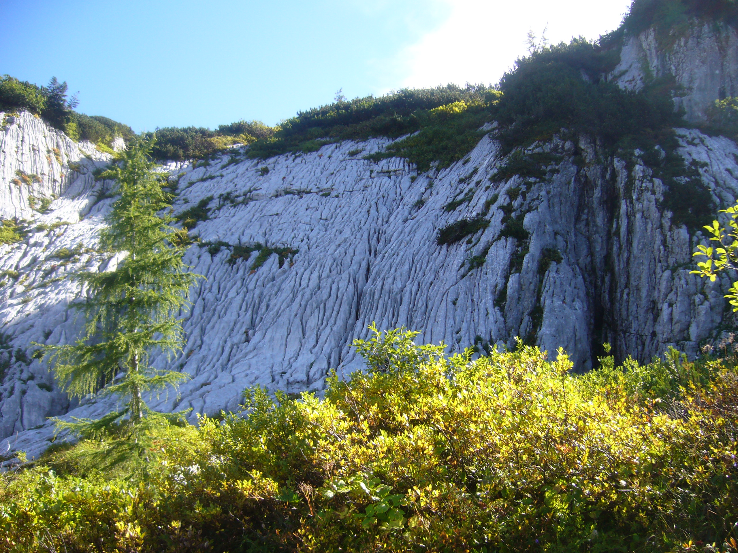 Campi solcati vicino a Sella Nevea